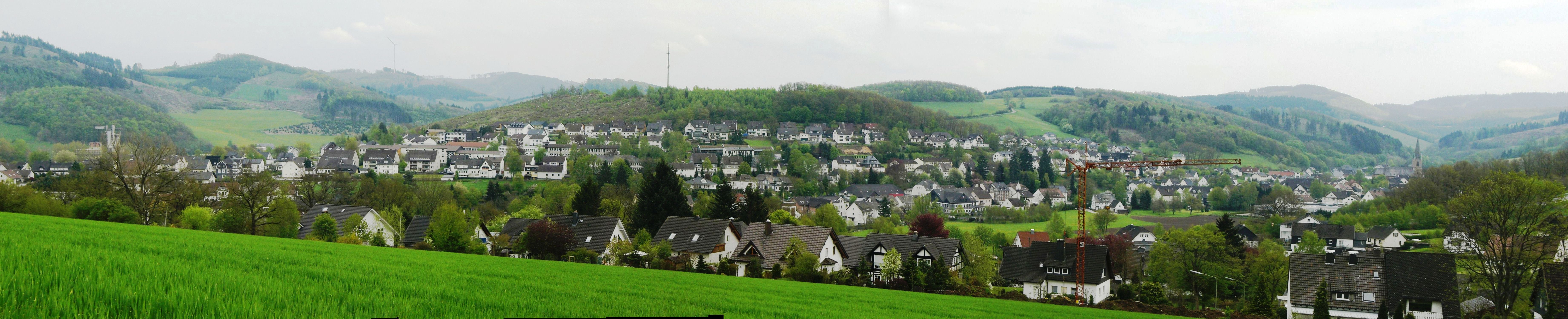 Blick auf Grevenbrück von unterhalb der Peperburg, links die Kalkwerke